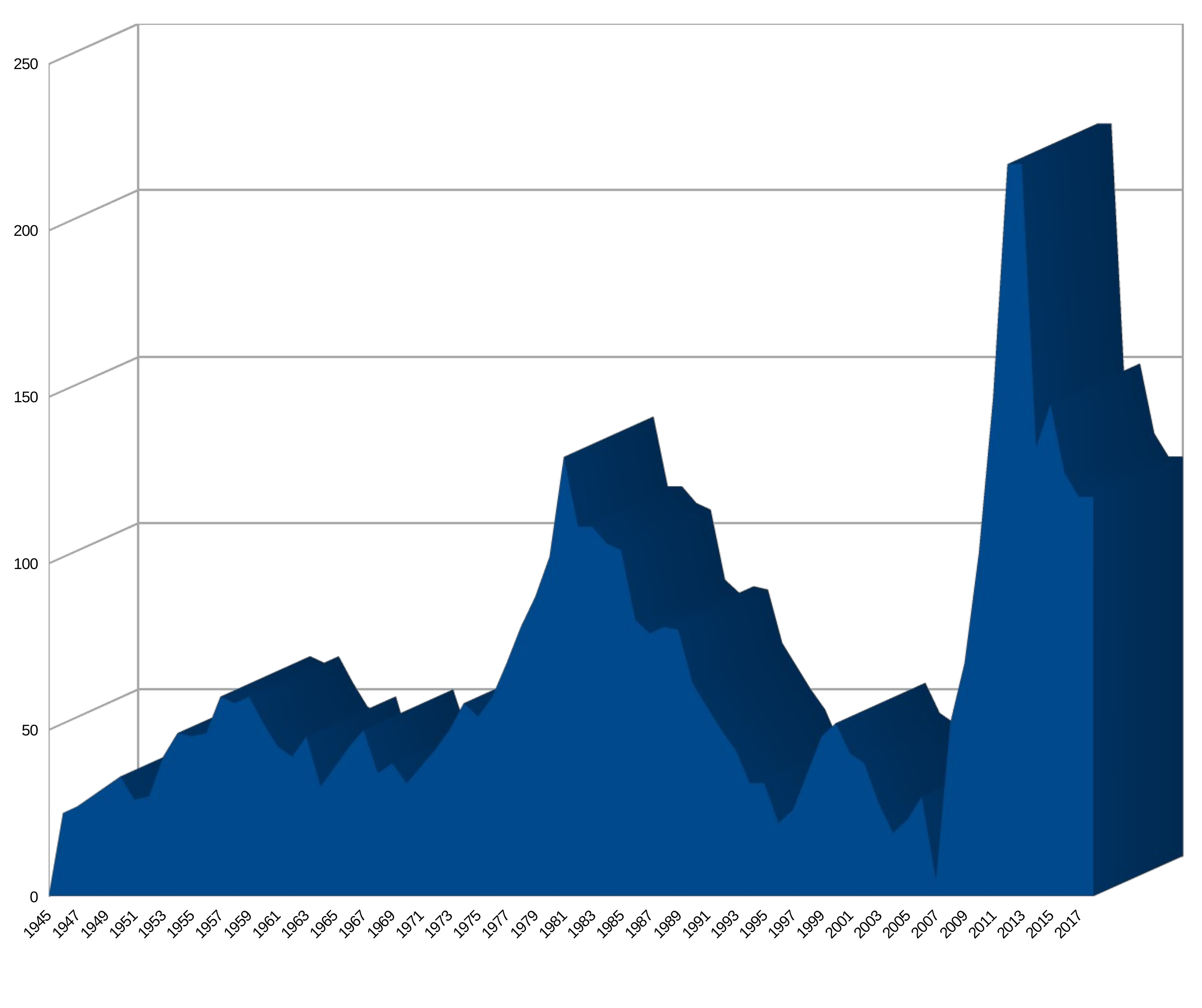 Saimaan kameraseuran jäsenmäärä 1946-2017